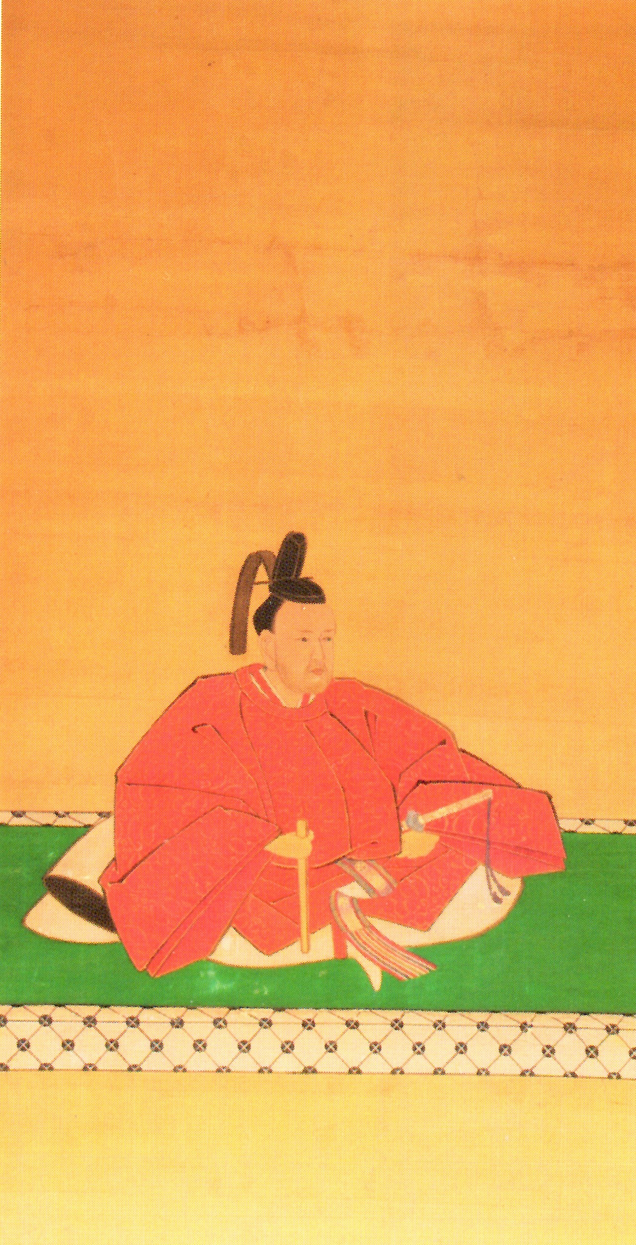 本多政均の肖像。